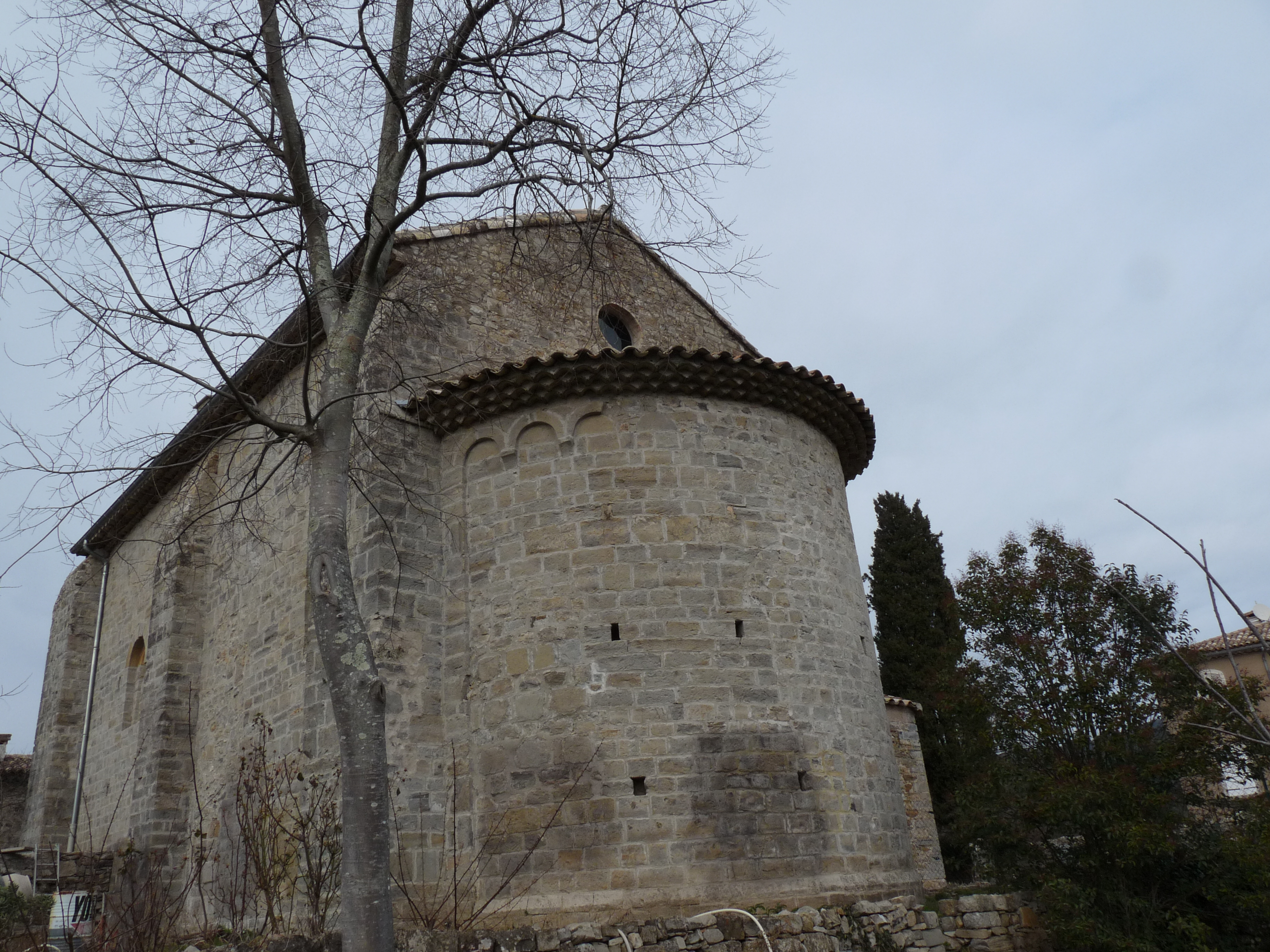 Chevet de l'église St-Vincent de Cros (Gard)